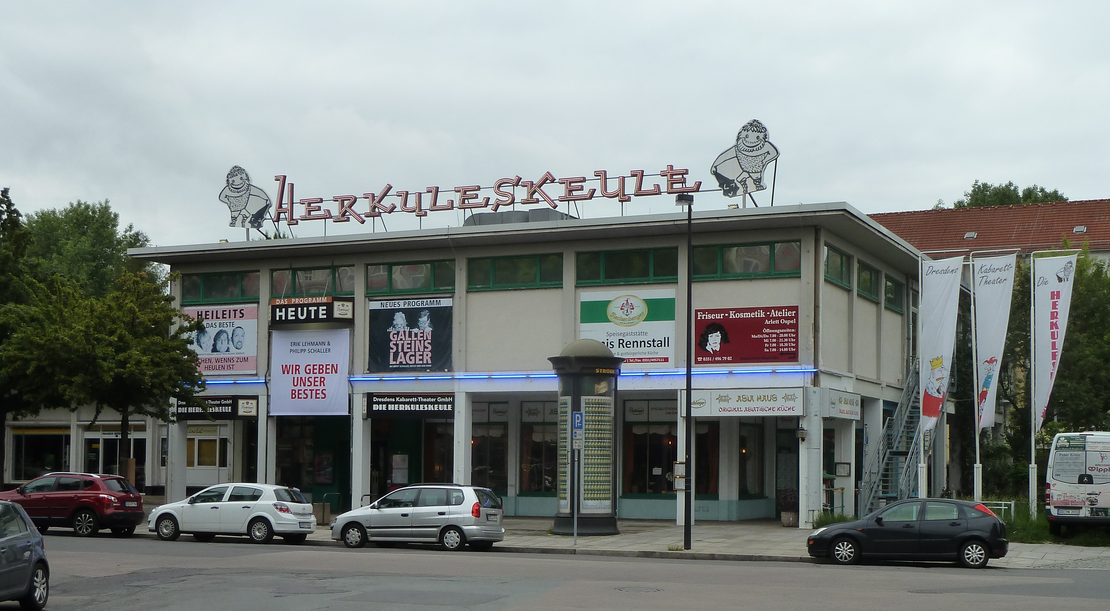 Kabarett-Theater Herkuleskeule am Sternplatz 1 in Dresden